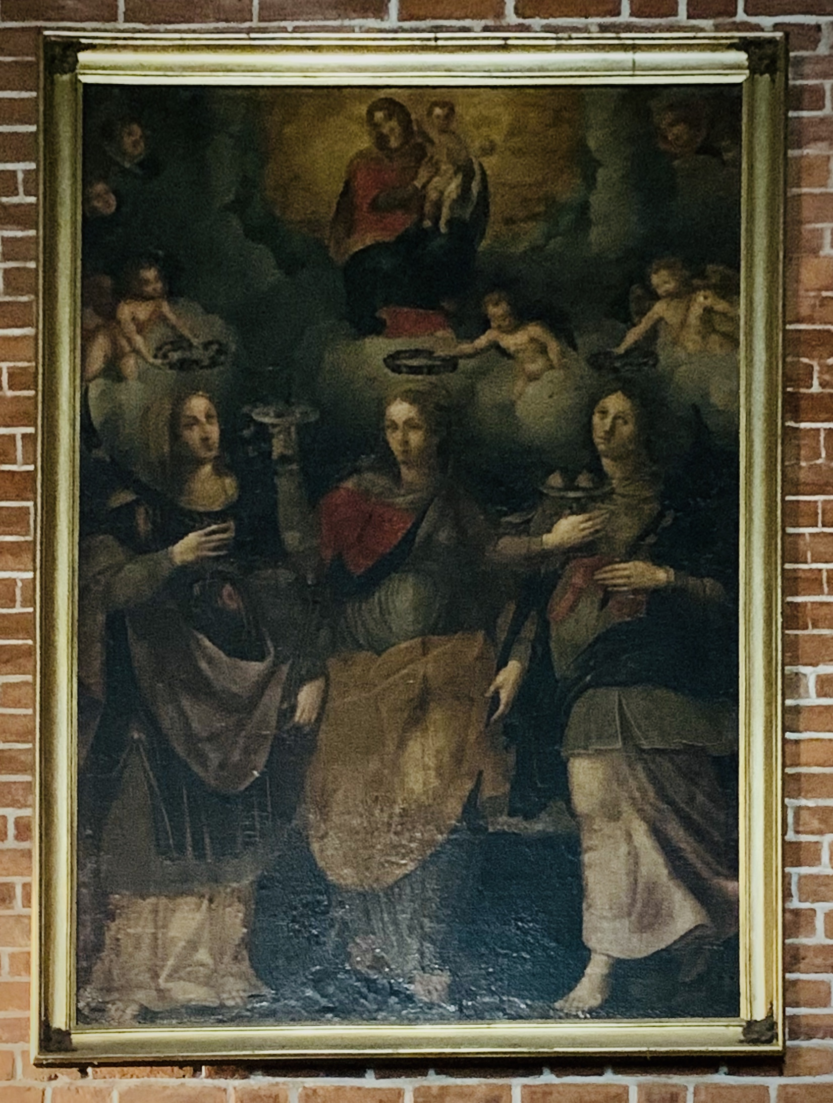 Pala dell'altare delle Sante Cecilia e Apollonia